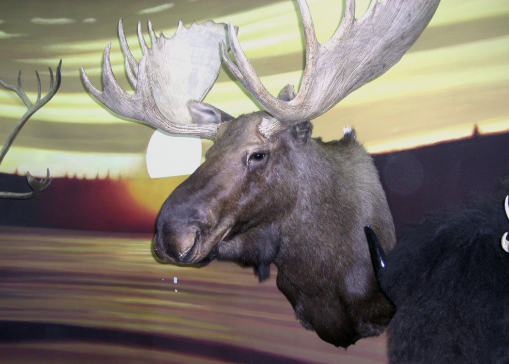 Alce.